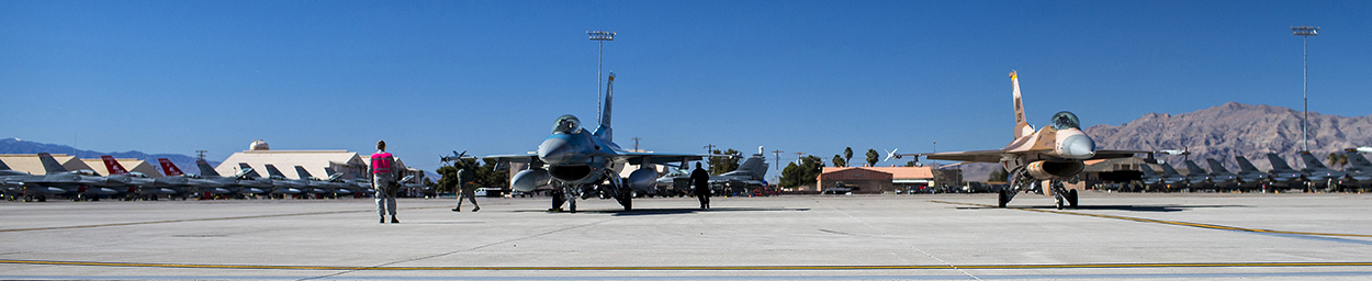 Las Vegas, 17 Februari 2017. Nederlandse F16's doen mee aan de grote internationale luchtmacht oefening "Red Flag". Samen met diverse buitelandse partners trainen zij in het luchtgevecht en het ontwijken van geavanceerde luchtverdedigingsystemen. De oefening werd dit jaar op Nellis Airforce base gehouden. Foto: Amerikaanse agressors met Nederlandse F-16's in de achtergrond.